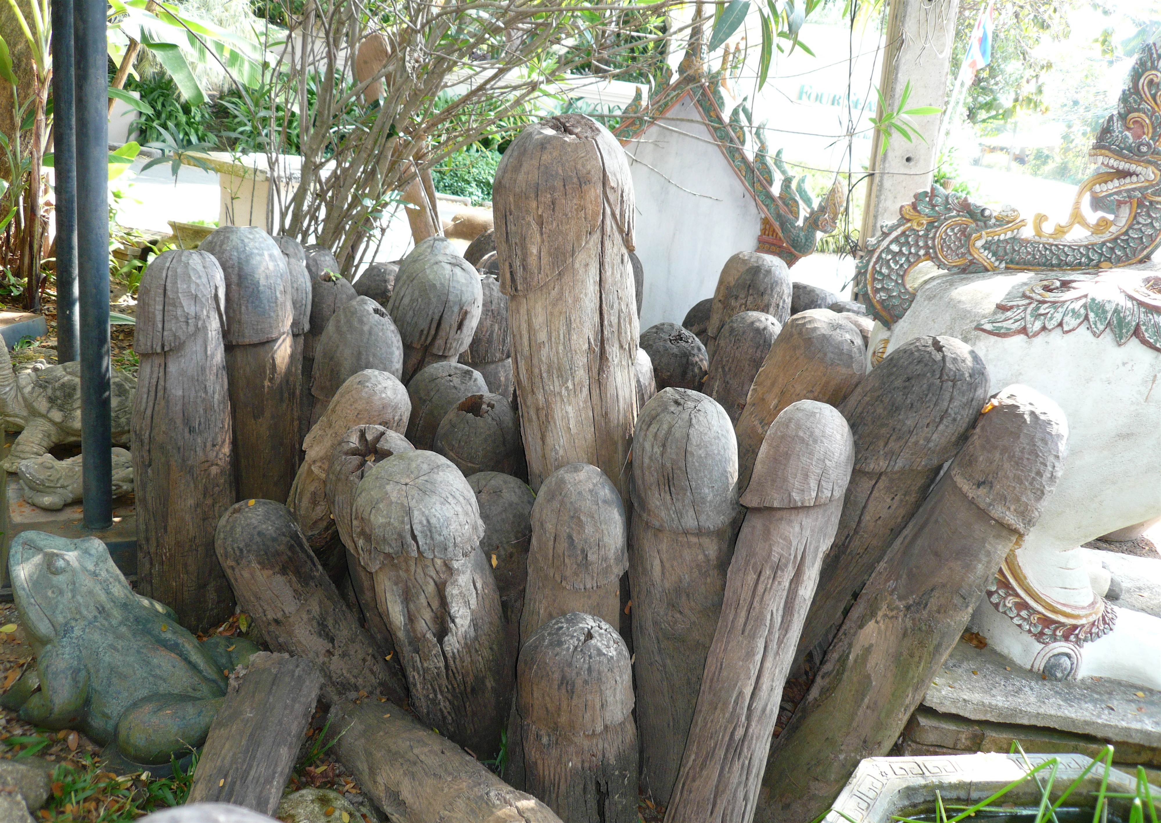 Carved wooden lingam.